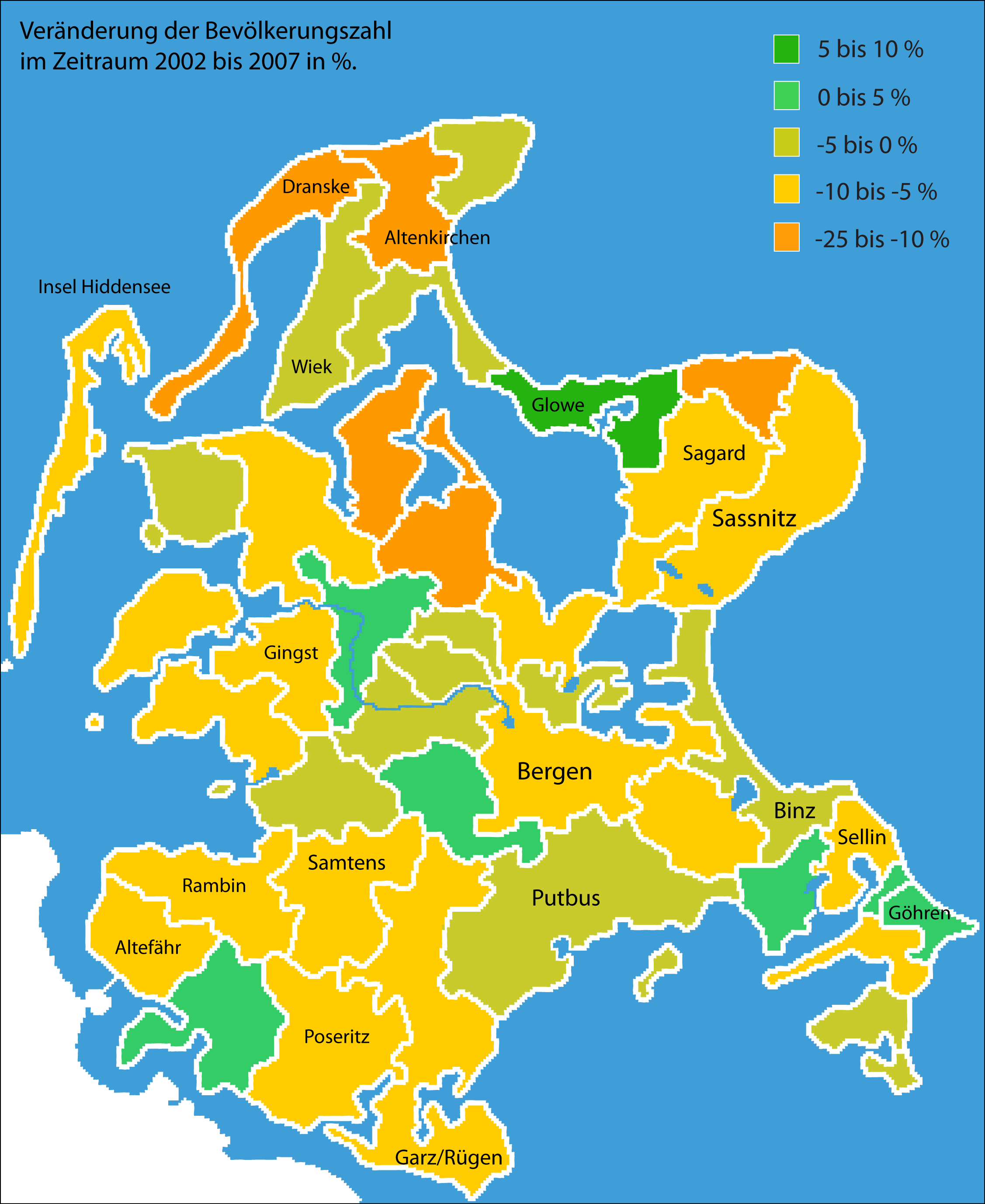 Bevölkerungsentwicklung_des_Landkreis_Rügen_2002-2007_nach_Gemeinden